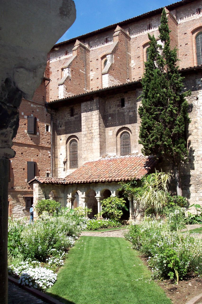 France, Tarn (81) Albi, Cloître Saint-Salvy (XIIIème siècle)